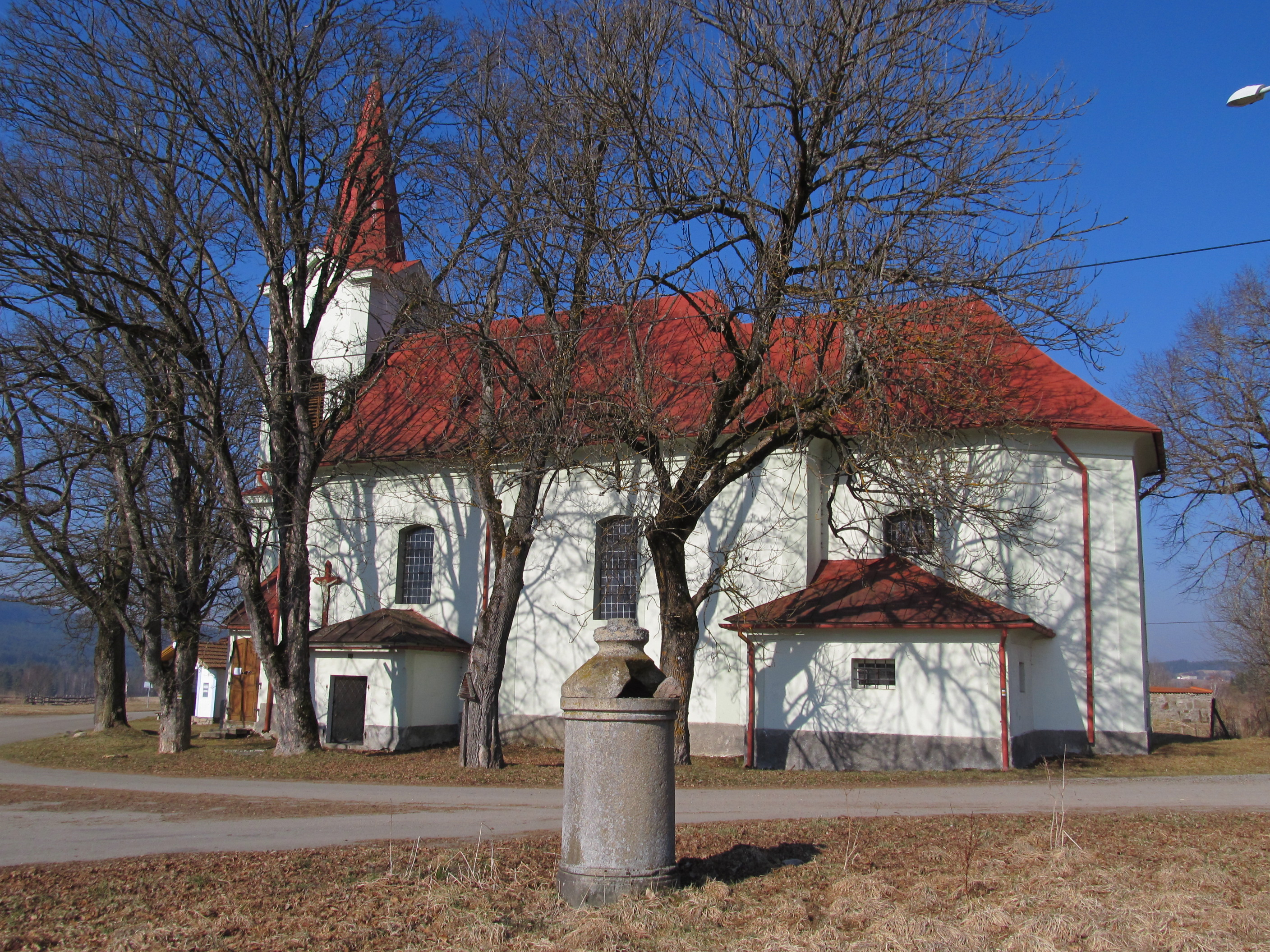 Pěkná - kostel svaté Anny